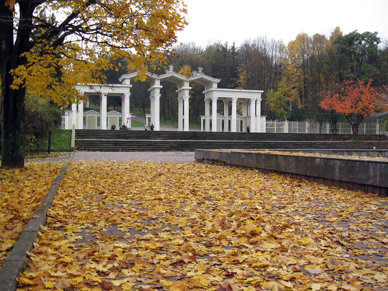 Ворота в парк культуры во Львове